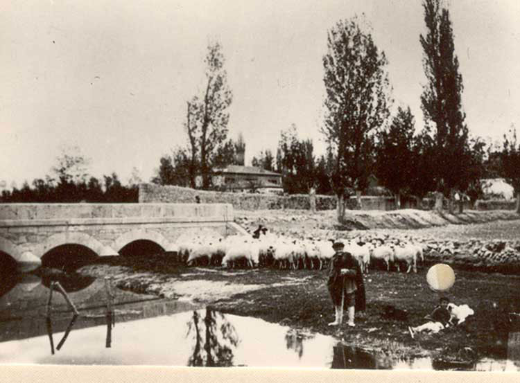 Vista panorámica - Renedo de Esgueva (Valladolid) - Colección de cromos álbum de Valladolid editado por la Caja de Ahorros Provincial en 1962. Vista del campo de Renedo, junto al rio, con rebaño de ovejas y puente. - Fotografía 60 x 42 B/N